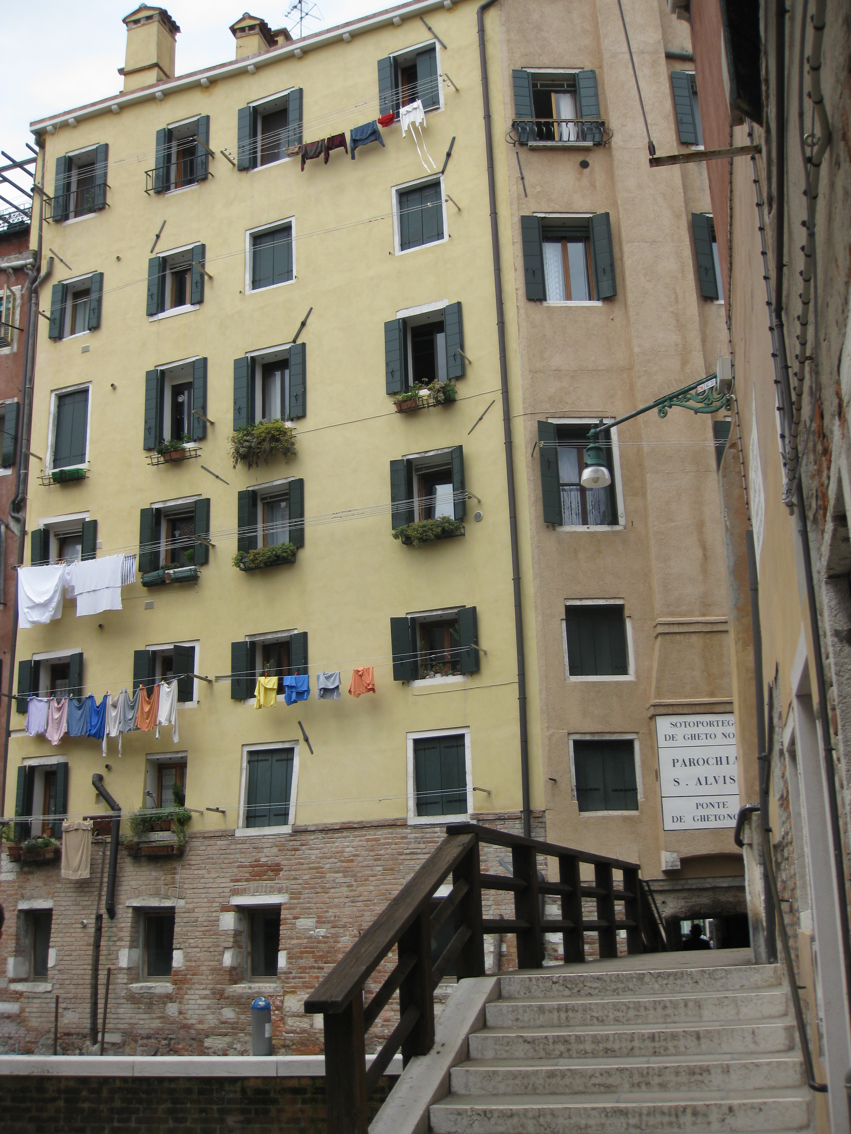 Ghetto הגטו